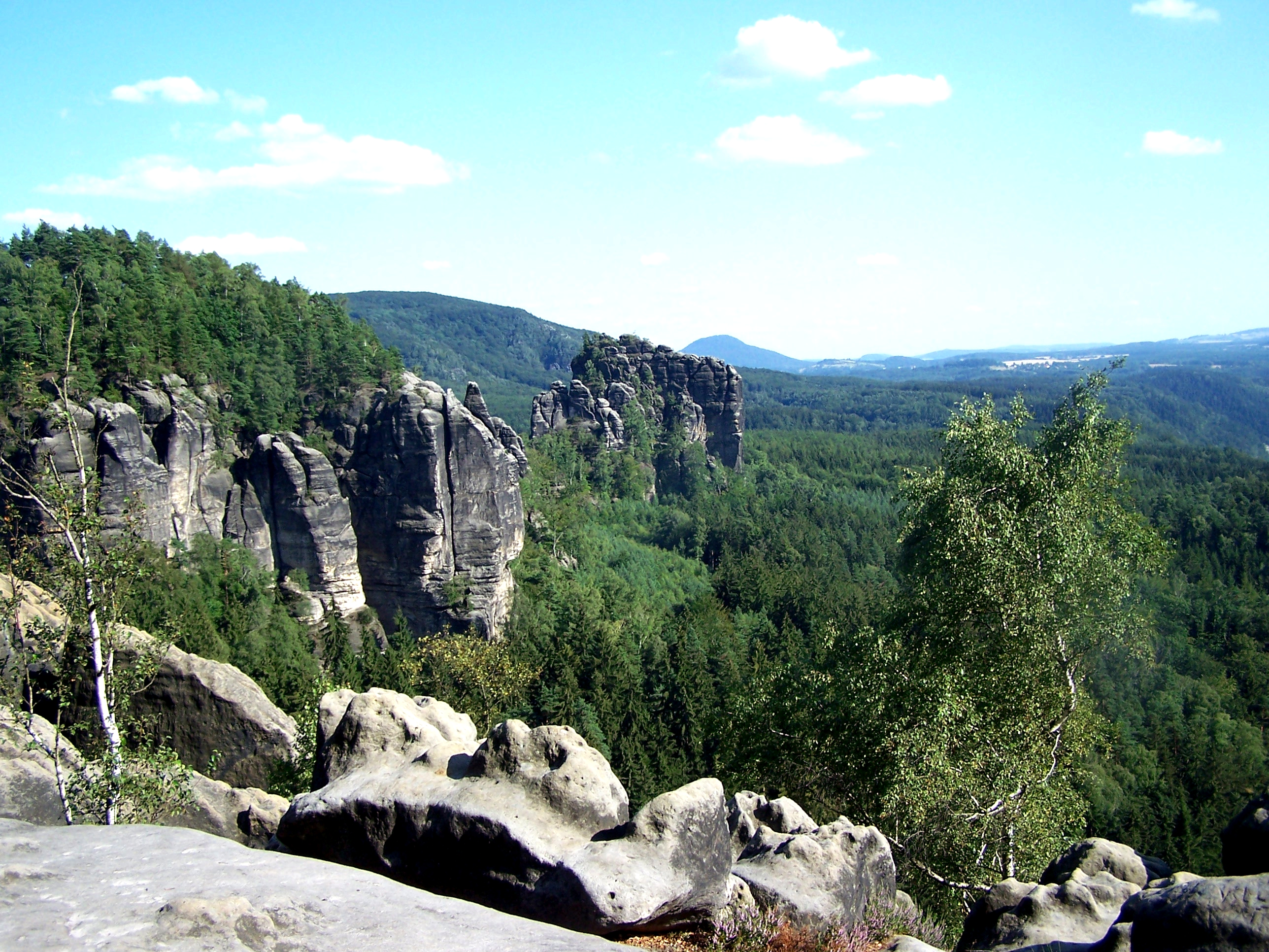 Sächsische Schweiz: Rauschenstein vom Schrammsteinweg oberhalb der Breiten Kluft, im Hintergrund Großer Winterberg und Rosenberg